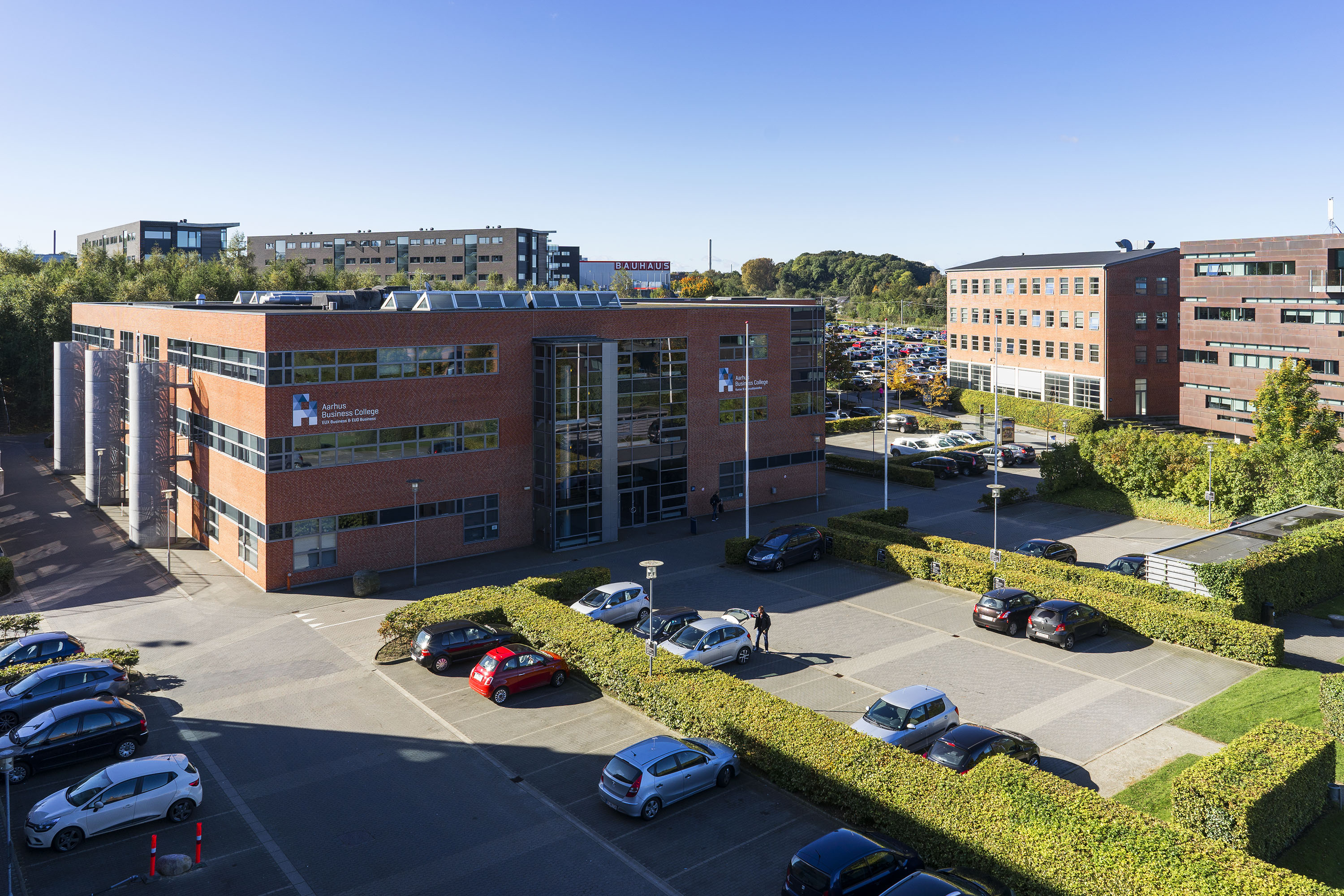 Aarhus Business Colleges bygning på Sønderhøj, Viby. Campus Sønderhøj som har uddannelserne EUX Business, EUD Business, EUD10 og Kurser og efteruddannelse.